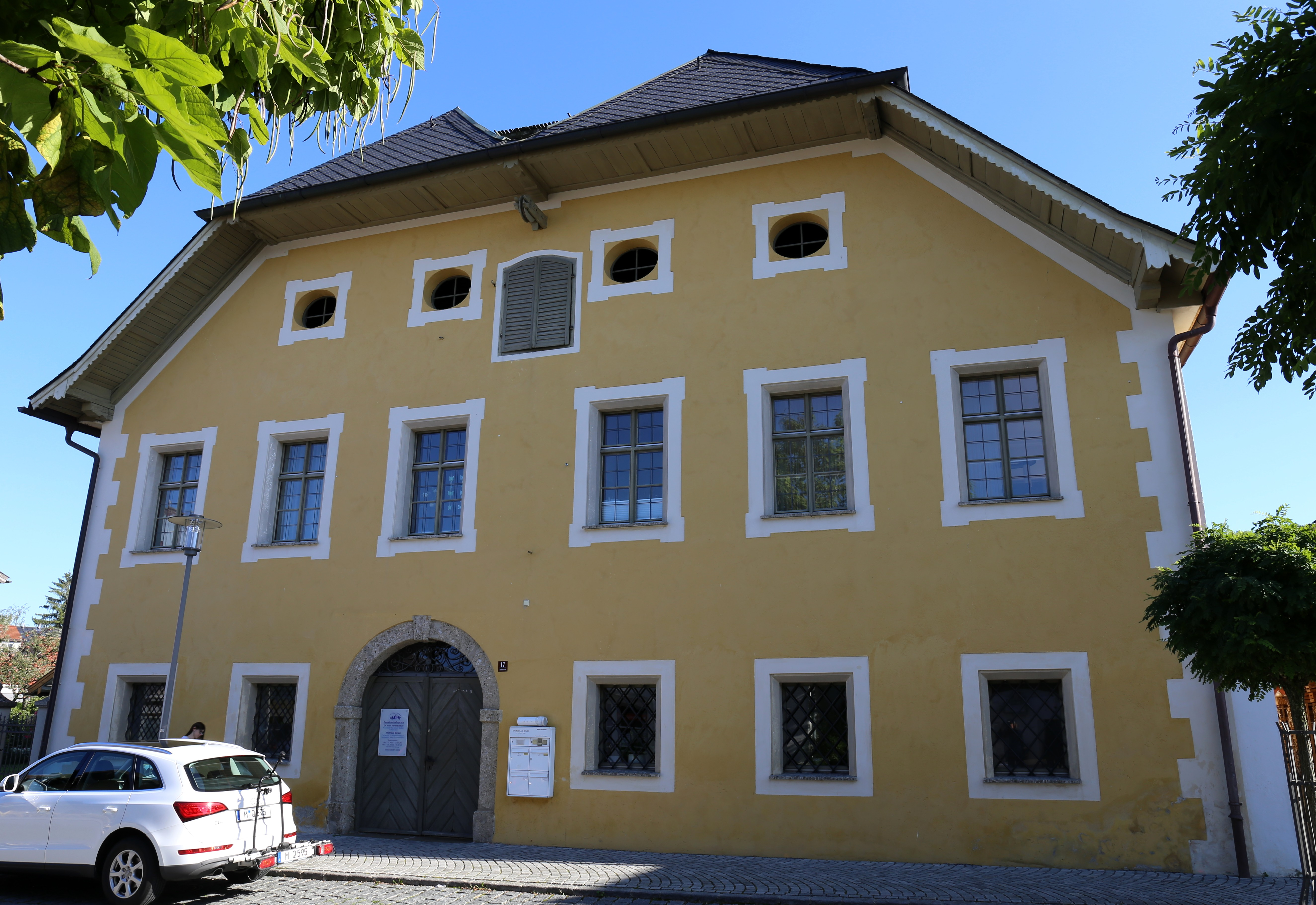 Bahnhofstraße 17, Waging am See; ehemals Gasthof Schwemmbräu, bis 1816 Salzburgisches Pfleggericht, stattlicher zweigeschossiger Putzbau mit zweigeteiltem Schopfwalmdach, im Kern 16. Jahrhundert, Fassade 17. Jahrhundert